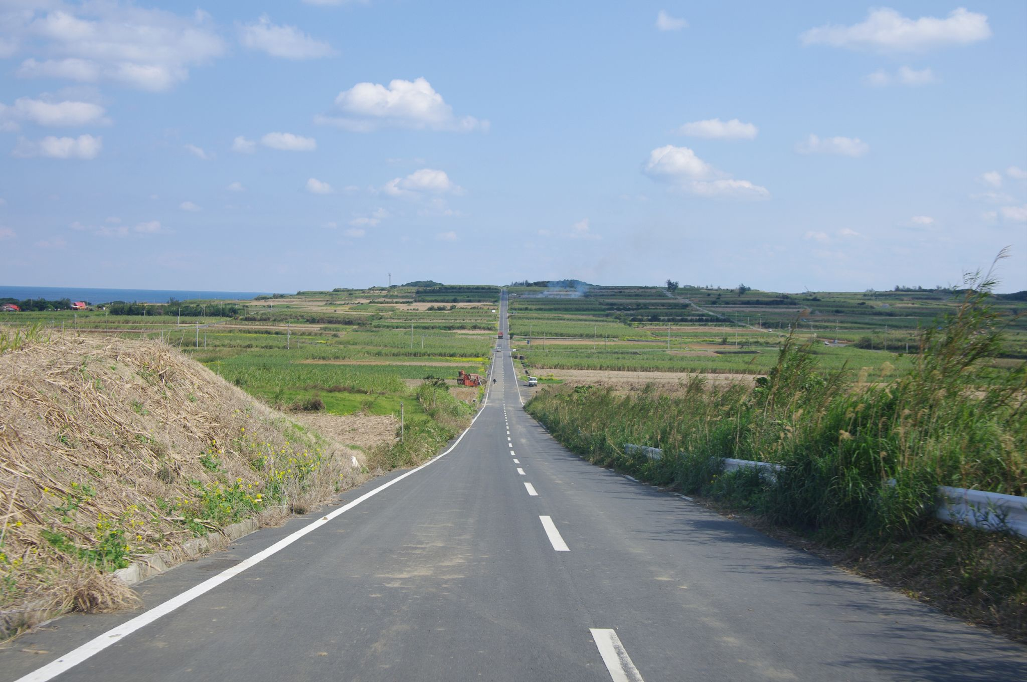 喜界島の島内風景。島一面のサトウキビ畑が広がる。